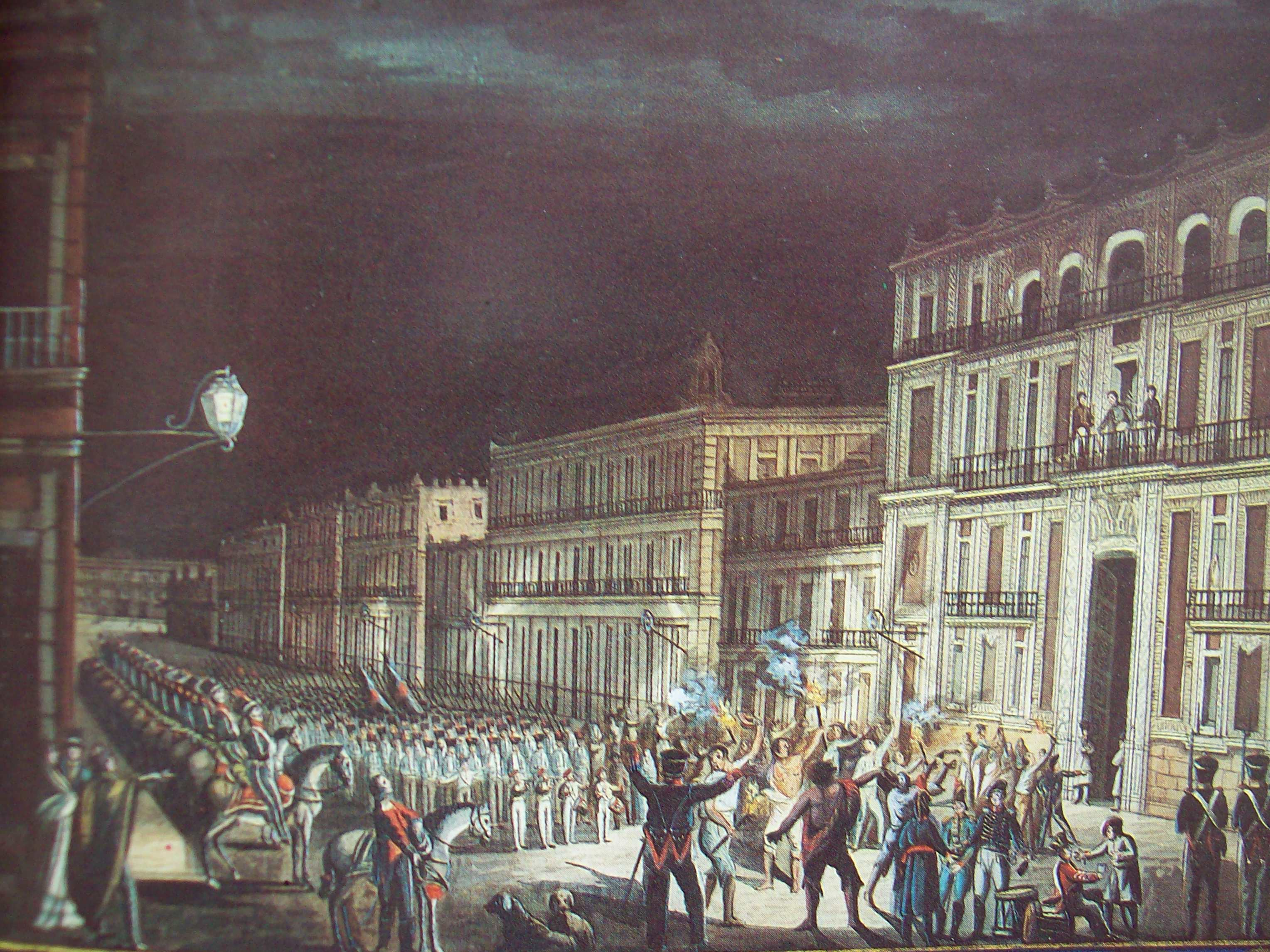 Proclamación de Iturbide el 19 de mayo de 1822. Acuarela anónima. Museo Nacional de Historia. INAH México